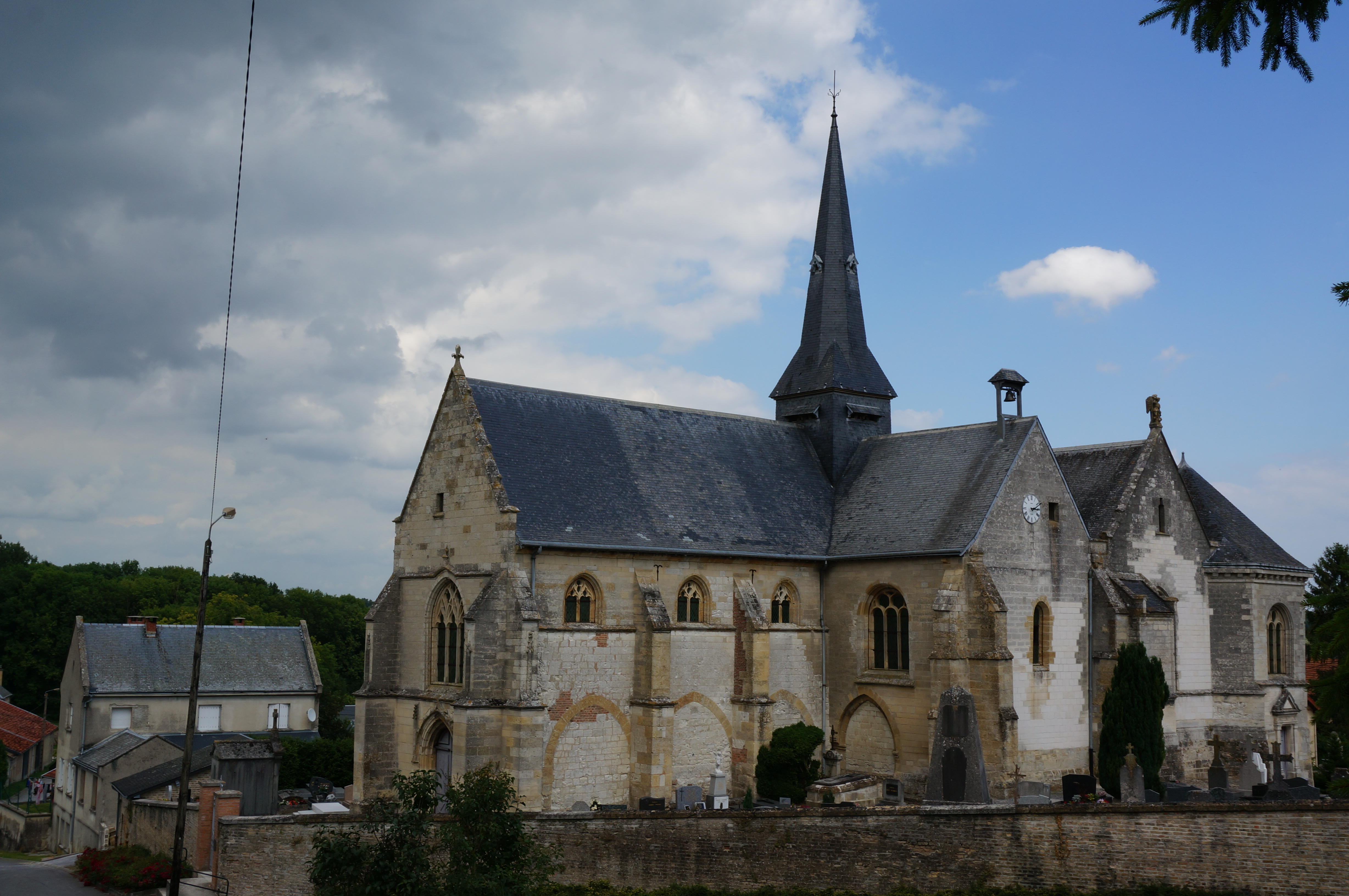 En l'Église Saint-Loup de Thugny-Trugny.